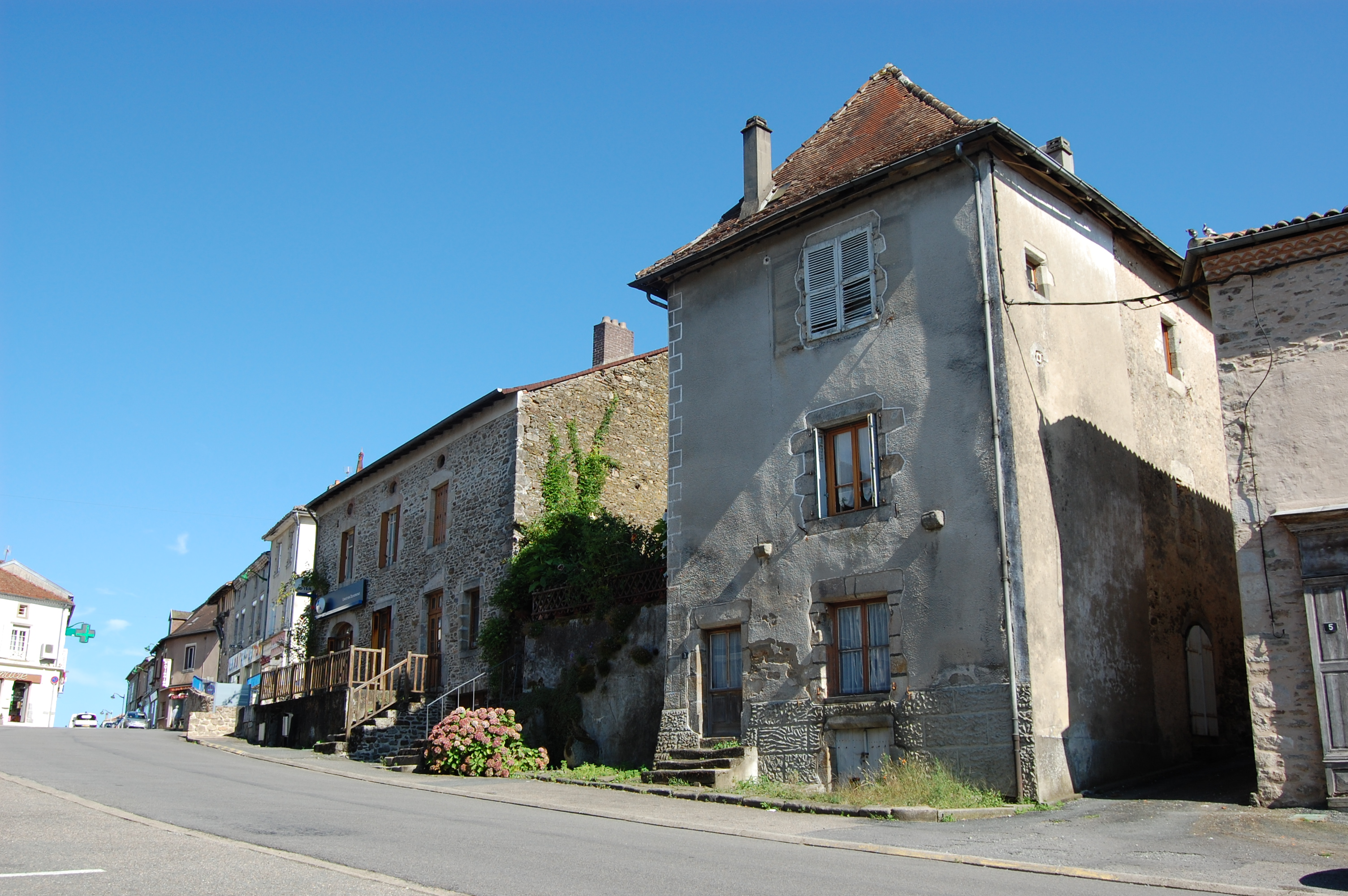 Châlus, ville basse